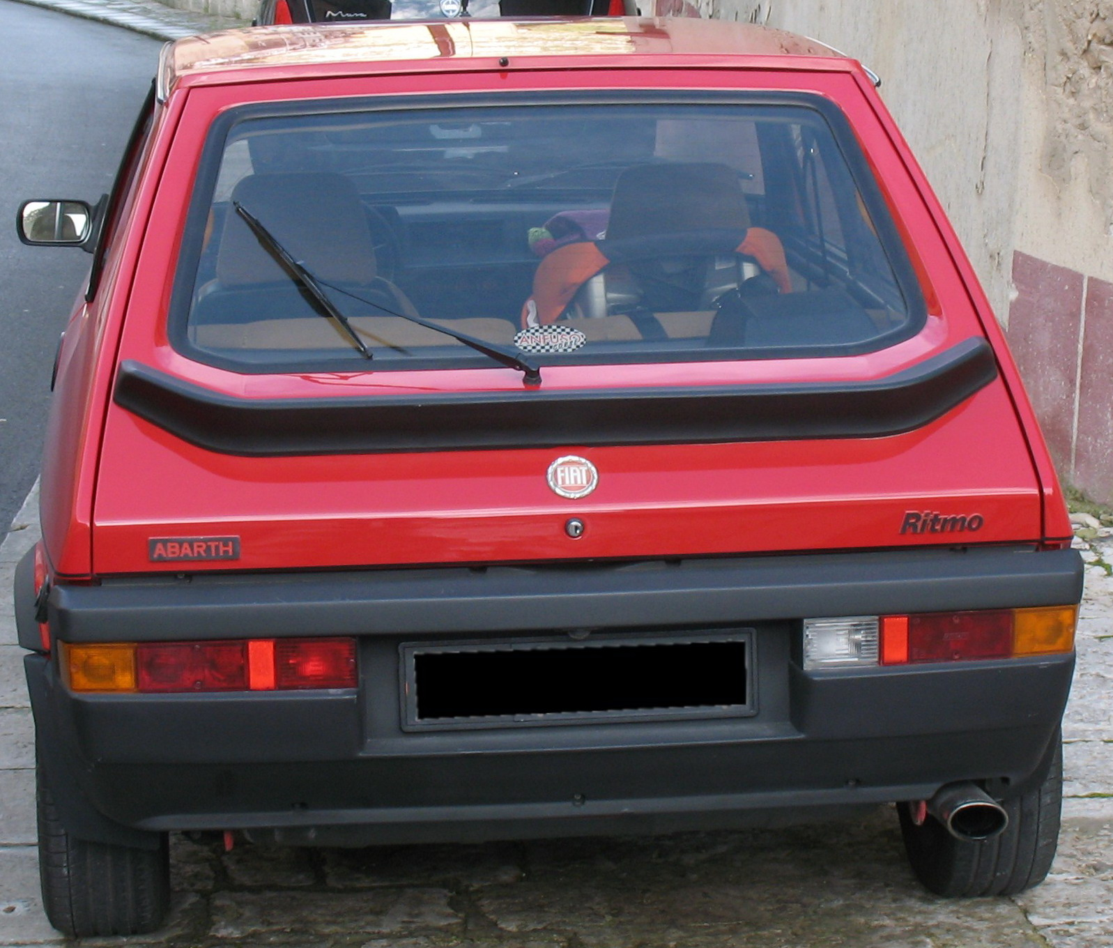 Fiat Ritmo Abarth, parte posteriore.